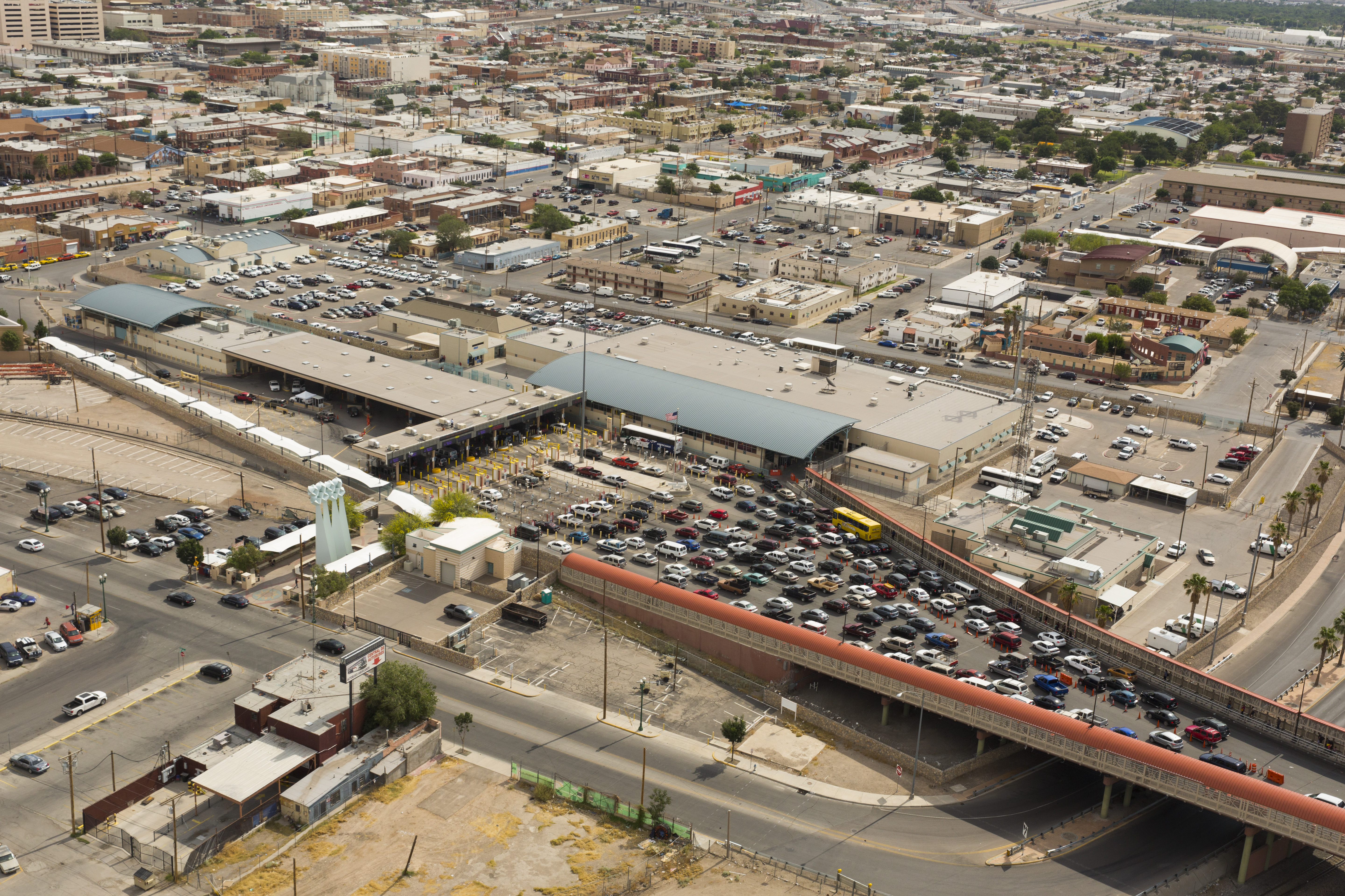 Paso Del Norte POE El Paso Texas